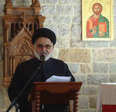 السيد هاني فحص يلقي كلمة في إحدى الكنائس